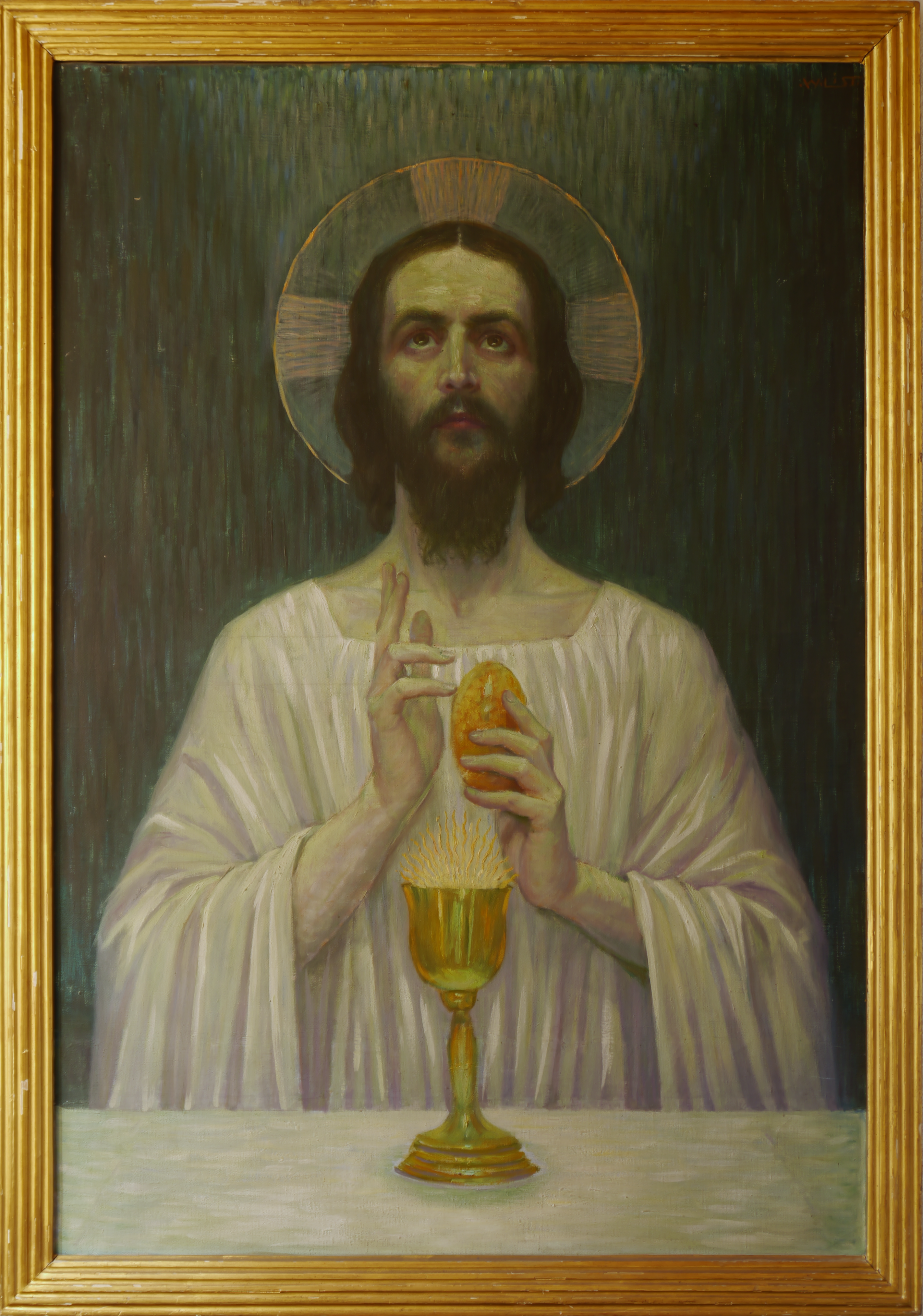 Gemälde von Wilhelm List (1864 - 1918), Erstellungsdatum nicht bekannt, geschätzt ca. 1905 Größe des innerhalb des Rahmens sichtbaren Gemäldes: 119 x 81 cm Signiert W. List oben rechts